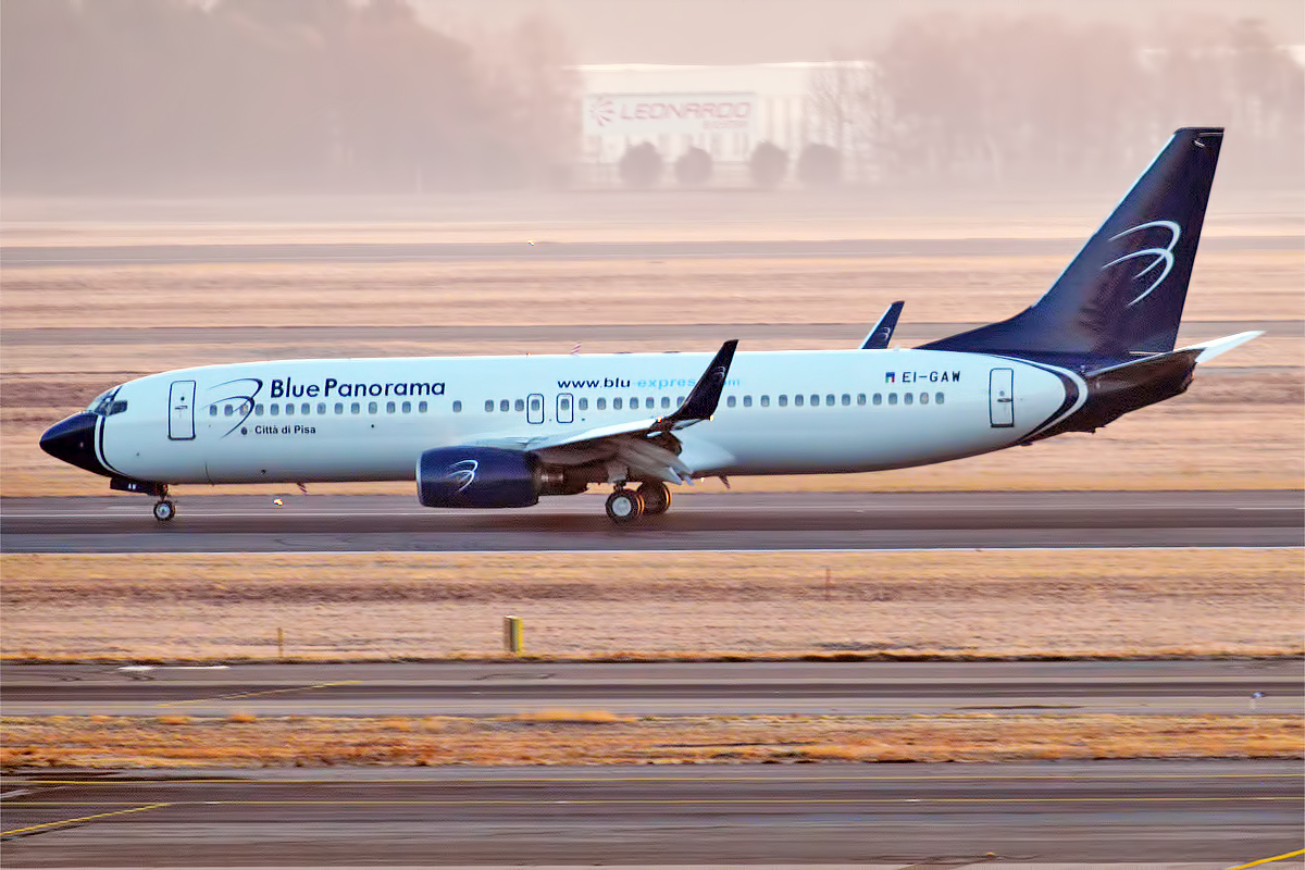 Blue Panorama, EI-GAW, Boeing 737-8Z0